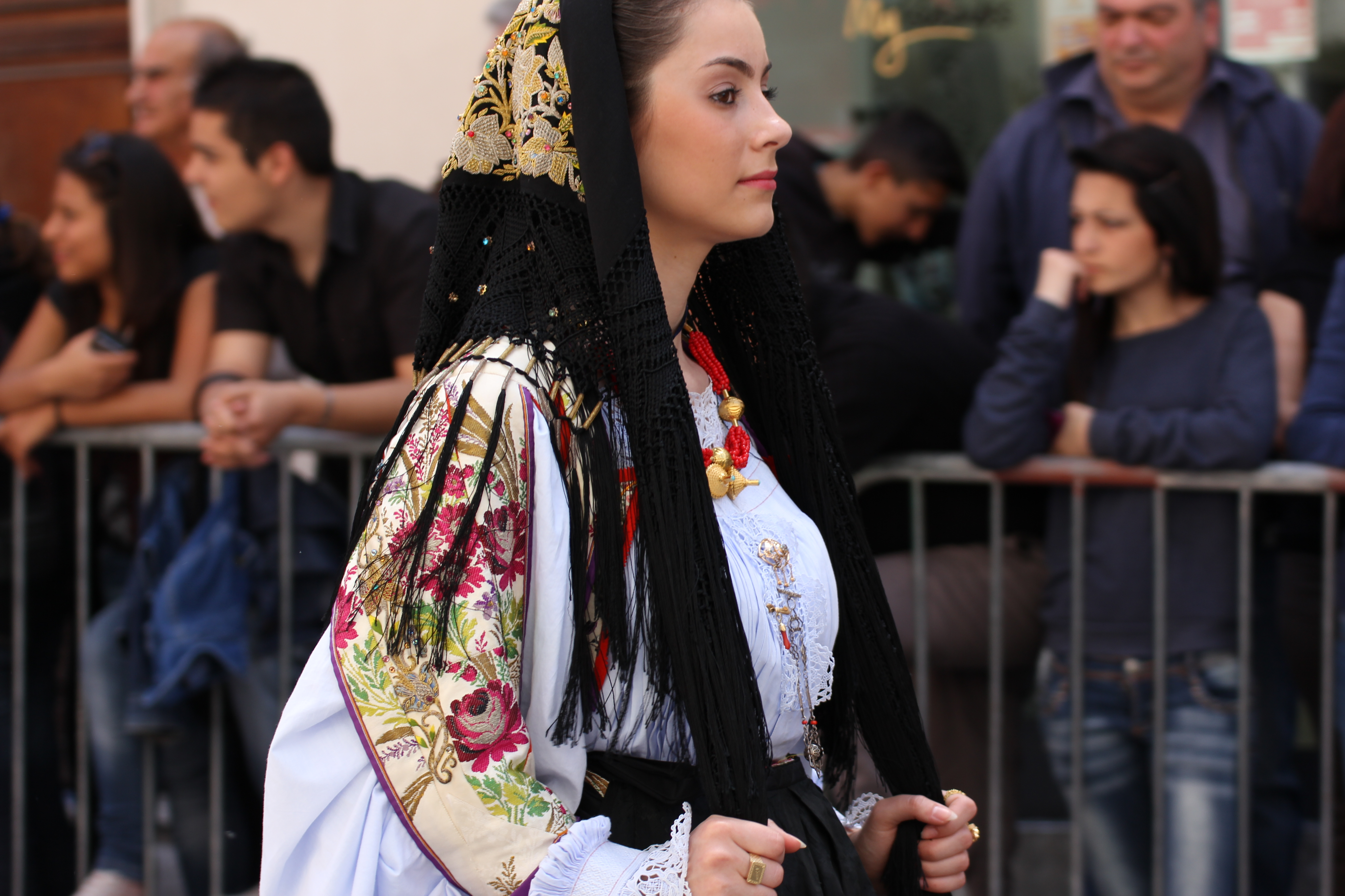 Costume tradizionale